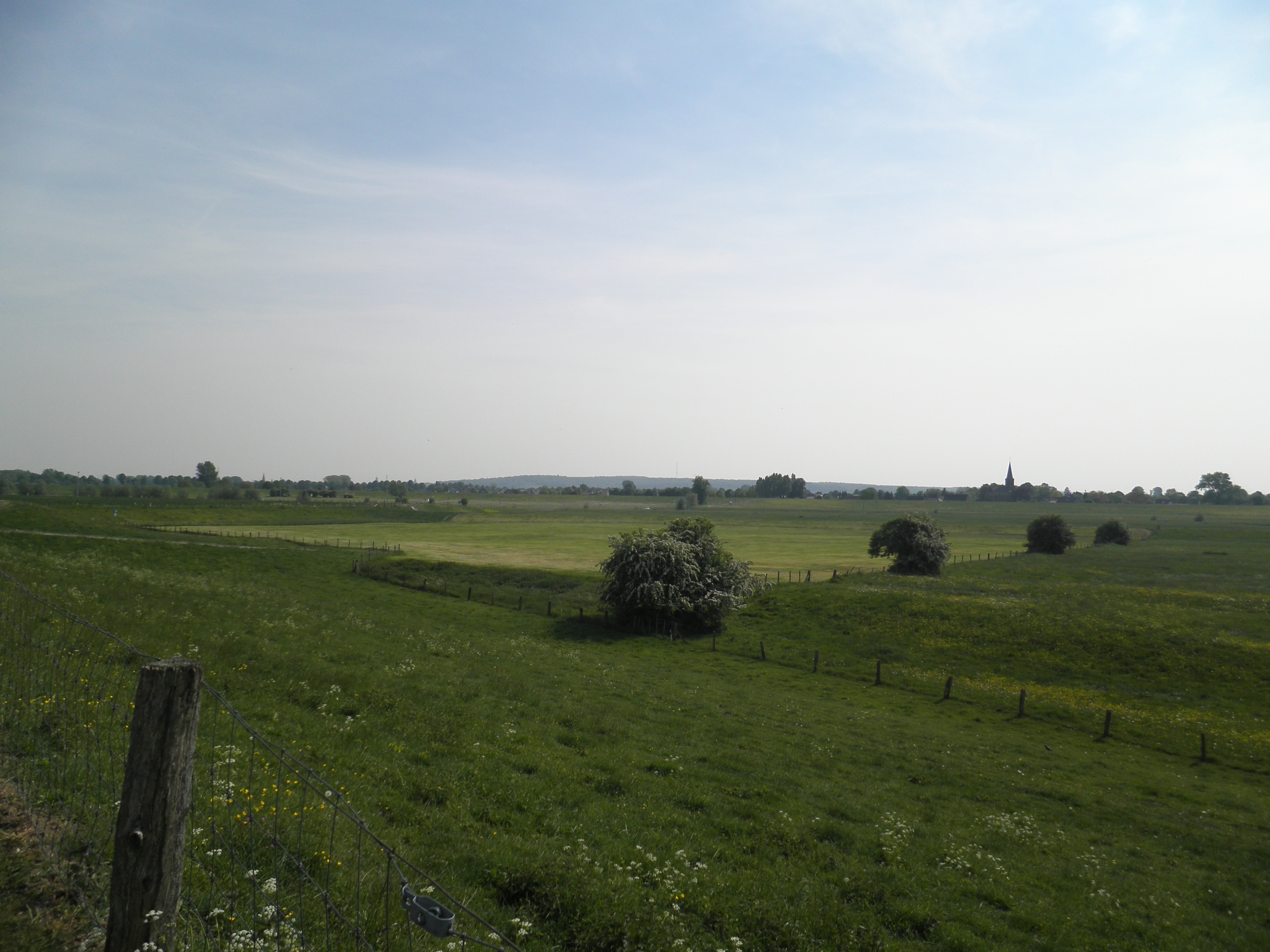 Blick von Schenkenschanz in südliche Richtung; Grünland im Naturschutzgebiet „Salmorth“, am Horizont rechts Düffelwarth